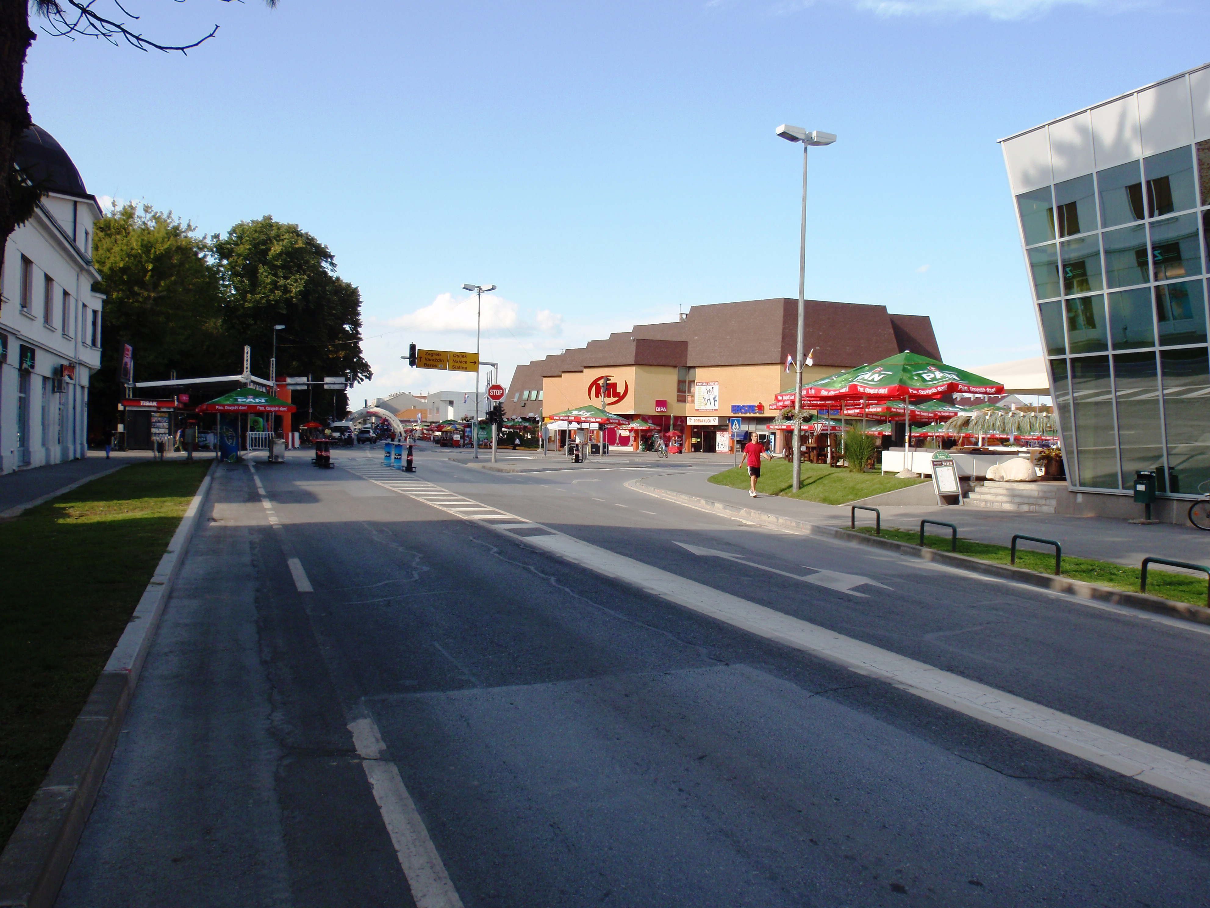 Virovitica